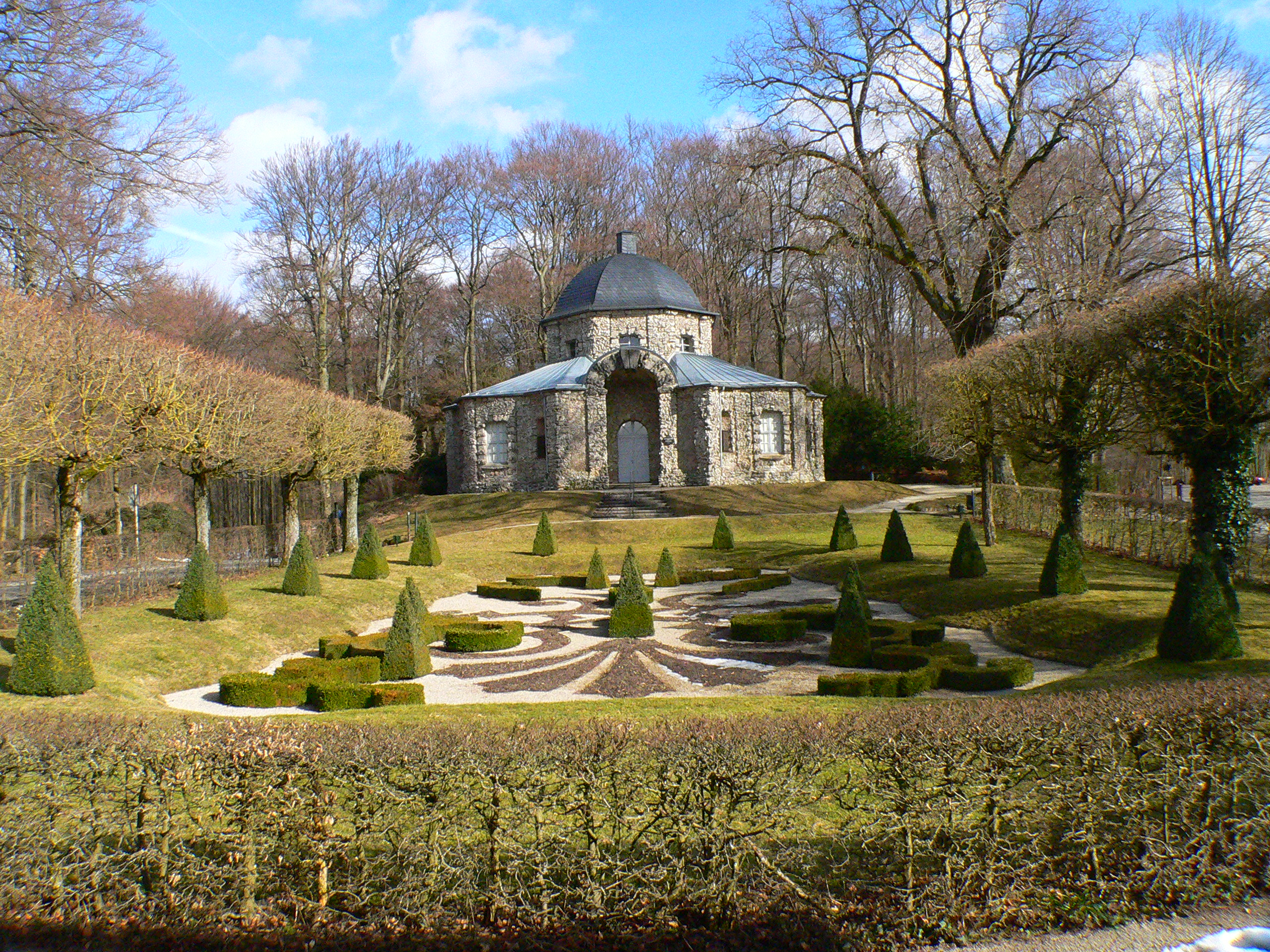 Felsengarten Sanspareil, Parterre mit Morgenländischem Bau - Fränkische Schweiz, Bayern